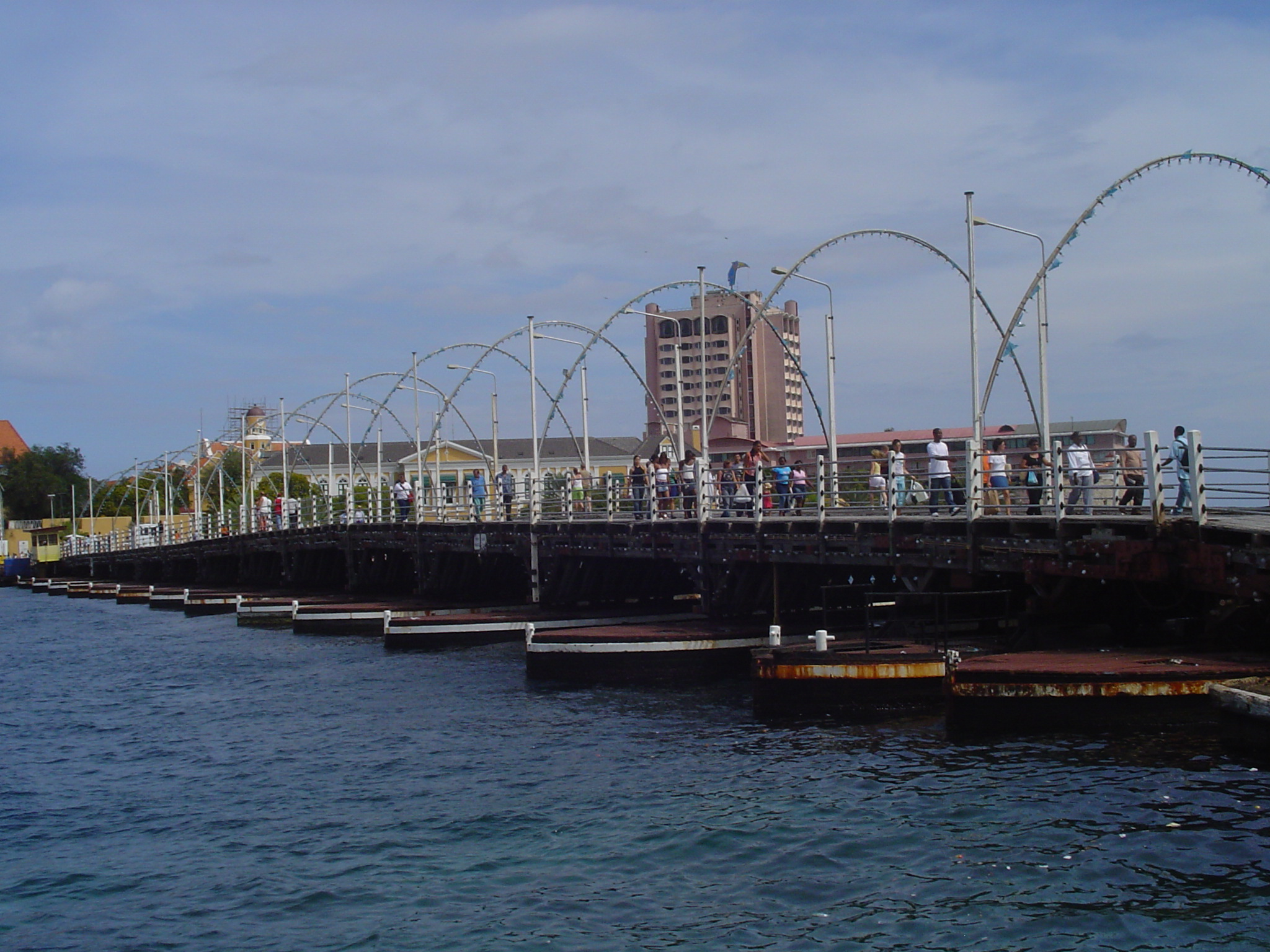 Deze foto heb ik in 2004 gemaakt toen ik bij familie op vakantie was op Curacao.